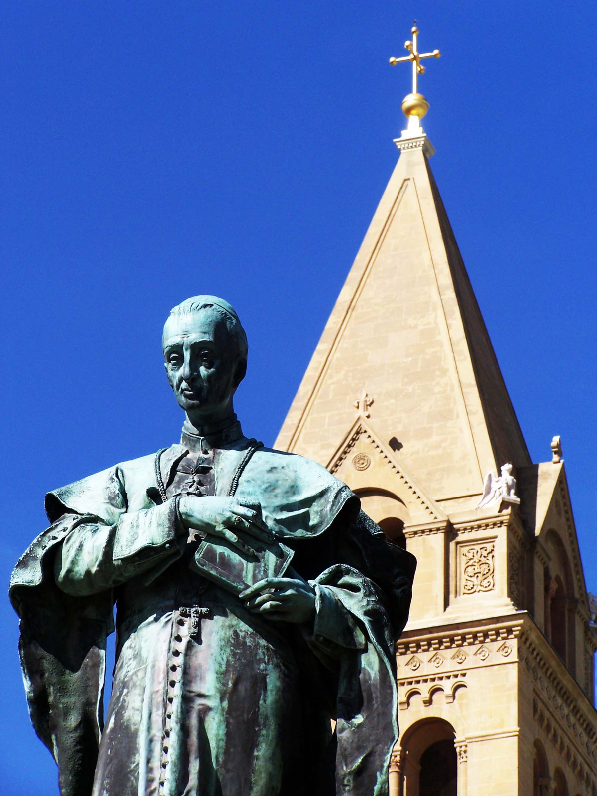 Székesegyház (Pécs, Dóm tér 23.) This is a photo of a monument in Hungary, Identifier: 1796 This is a photo of a monument in Hungary, Identifier: 1796